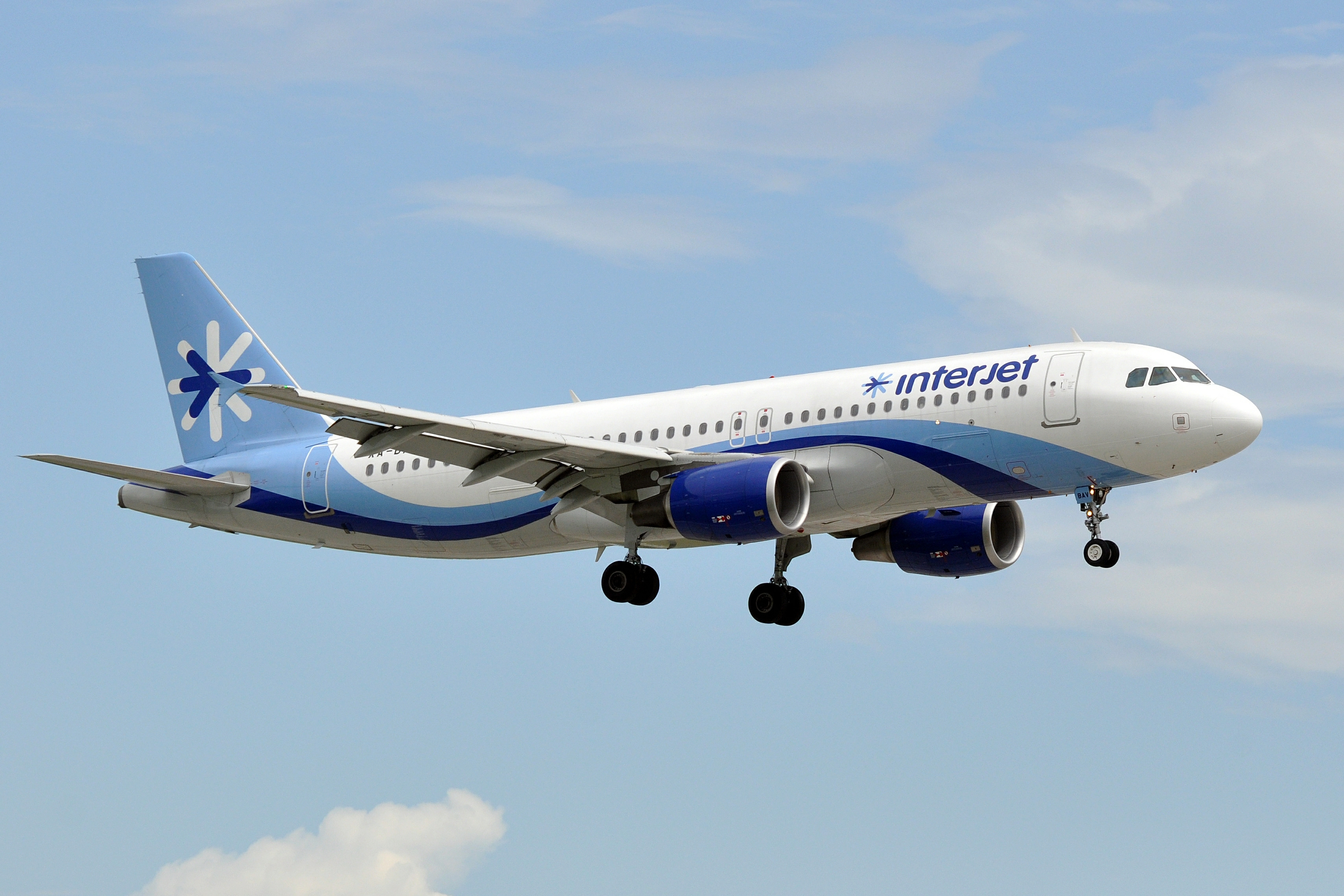 MSN 5372 A320-214 INTERJET MIA